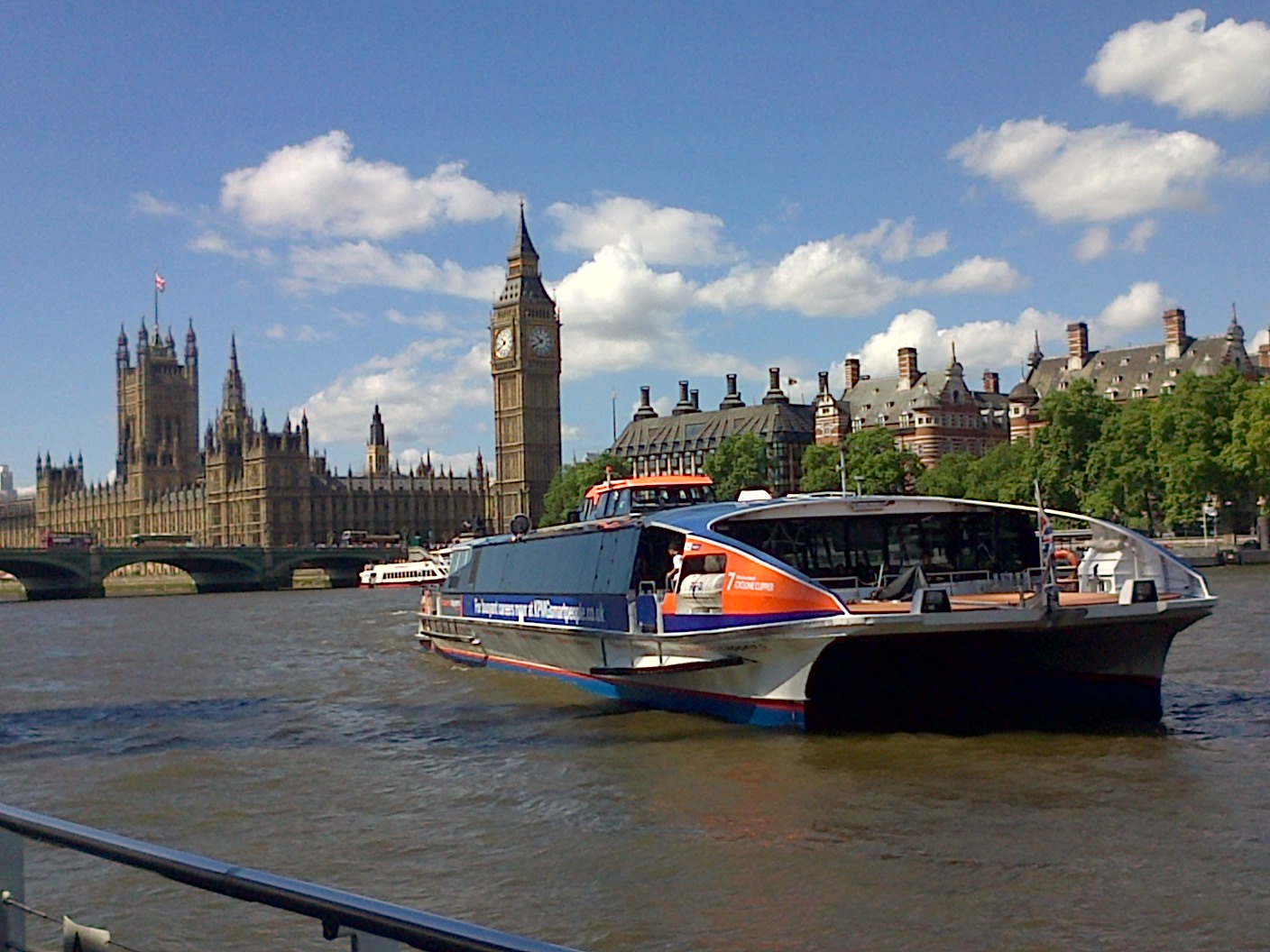 Navette sur la Tamise, passant devant la tour "Big Ben" du House of Parliament.